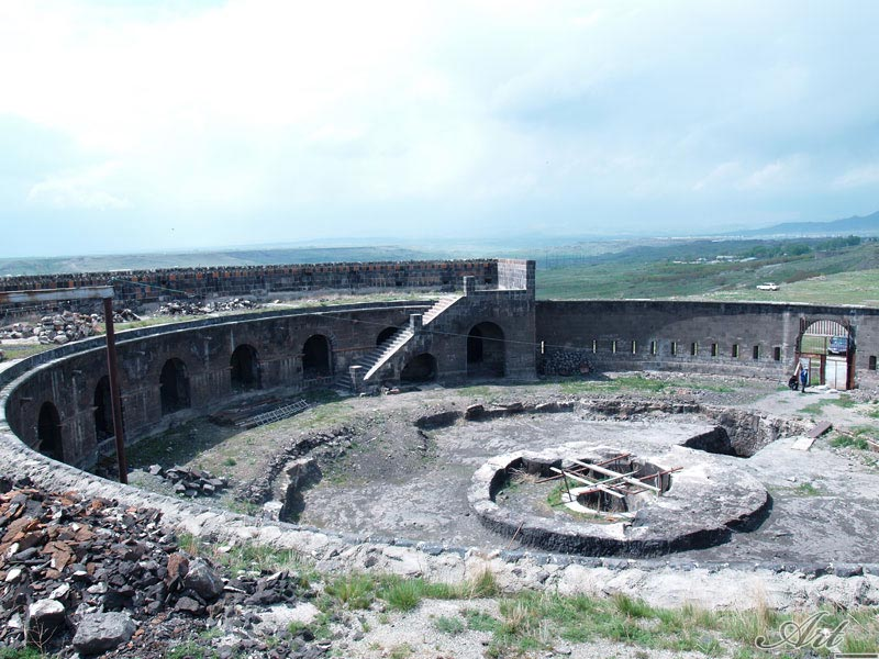 Гюмри Крепость-Гюмайри 001 1/2